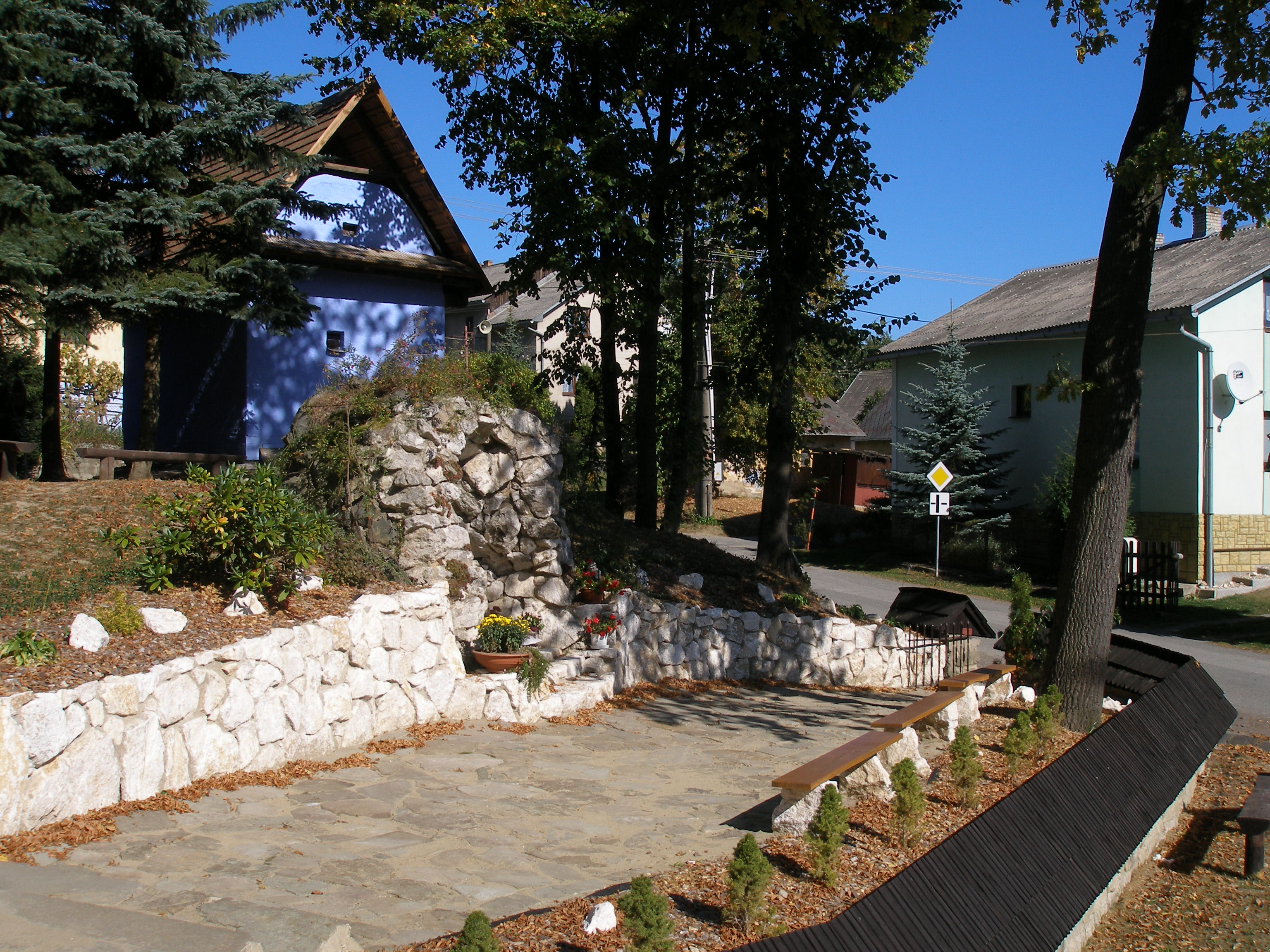 Šarišská obec Hervartov okres Bardejov.